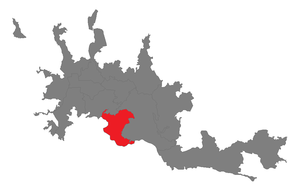 comuna universitaria de manizales